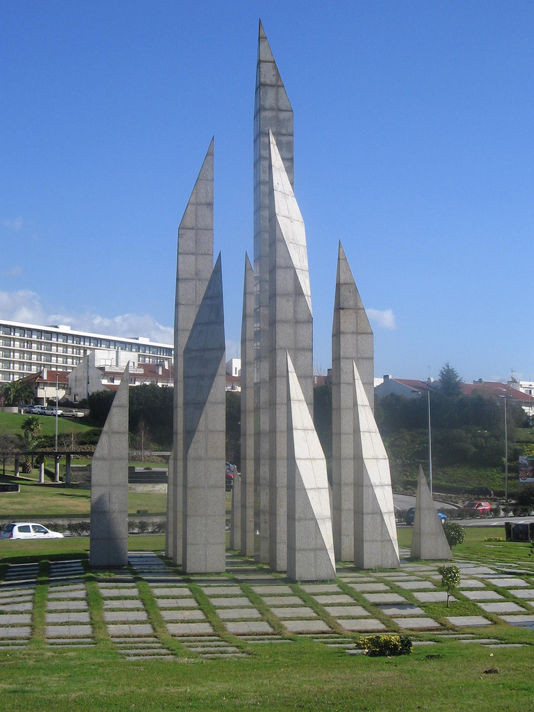 Monumento a la comunidad de Maia (Portugal) obra del arquitecto Luís Filipe Pais de Figueiredo e escultor y del escultor Zulmiro de Carvalho